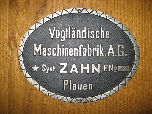 Fabrikschild